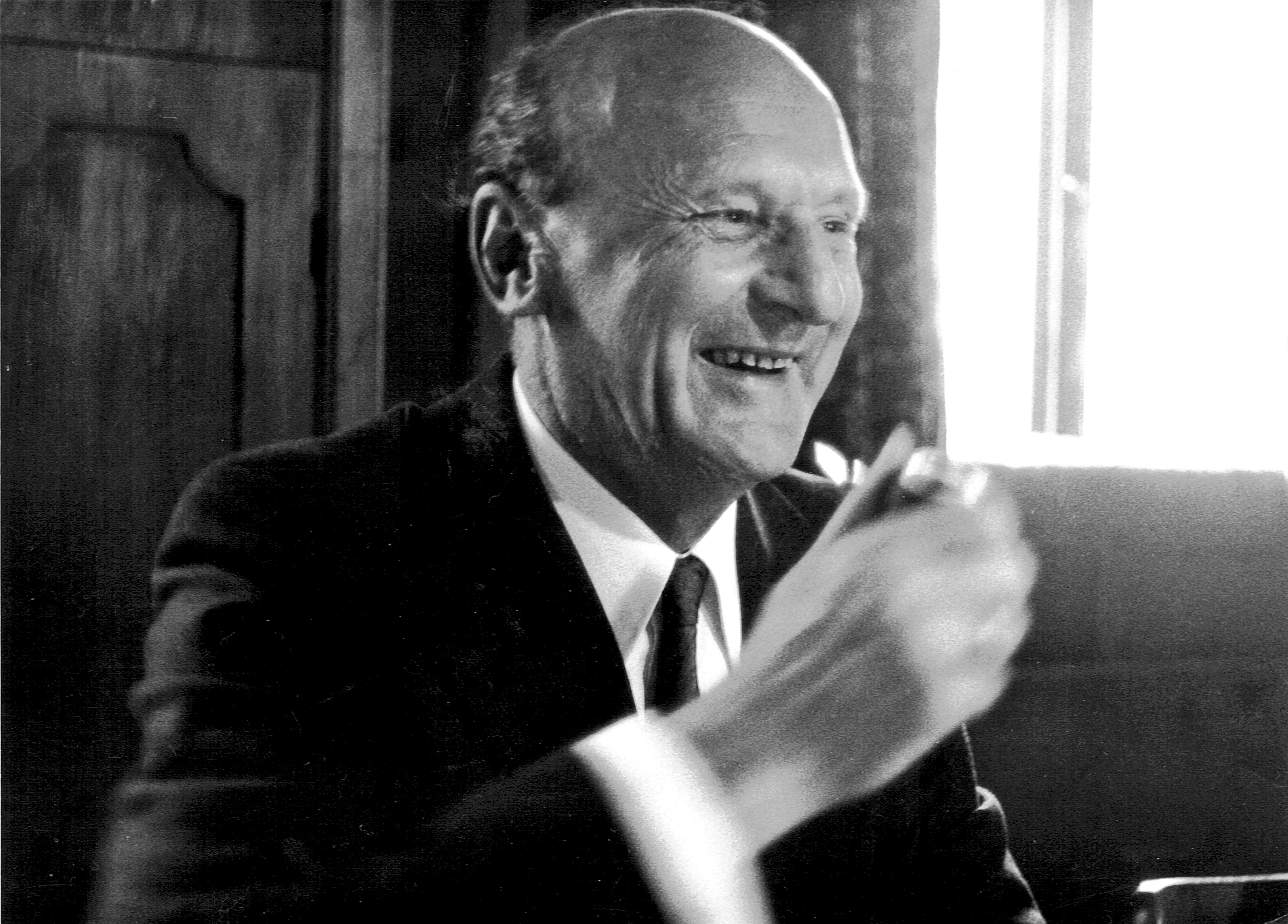 Prof. Dr. Friedrich (Fritz) Defant, 1914-1990